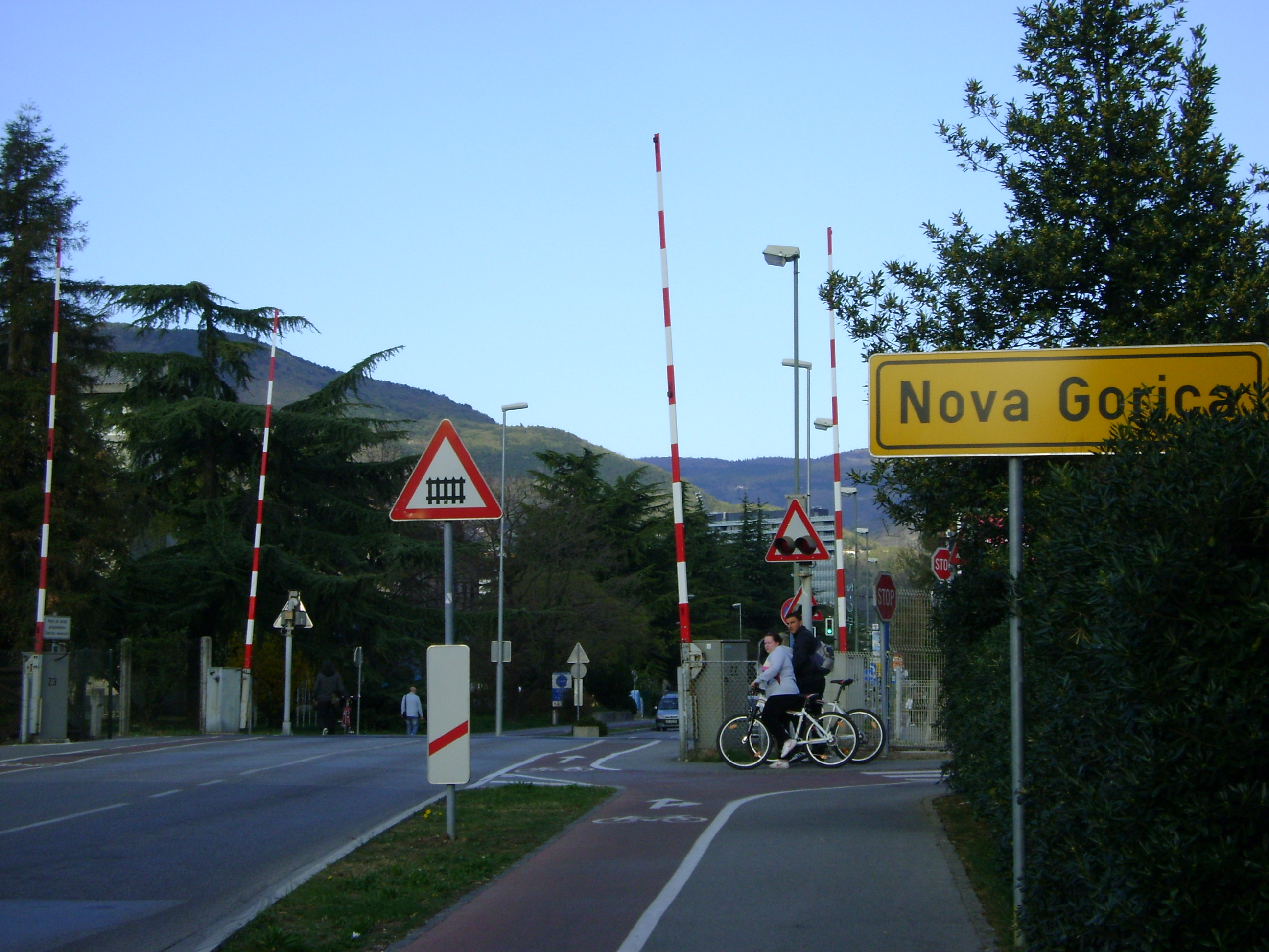 Ingresso a Nova Gorica dal valico di via San Gabriele